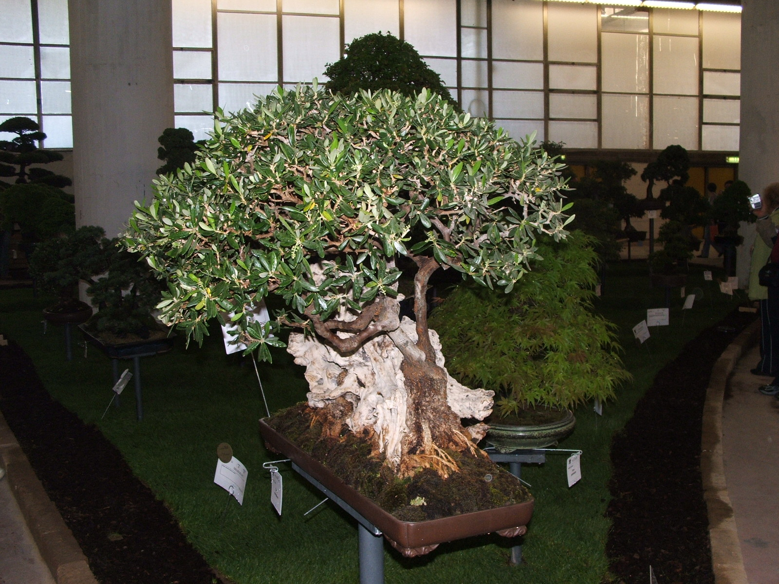 Genova - Euroflora - Bonsai, padiglione S